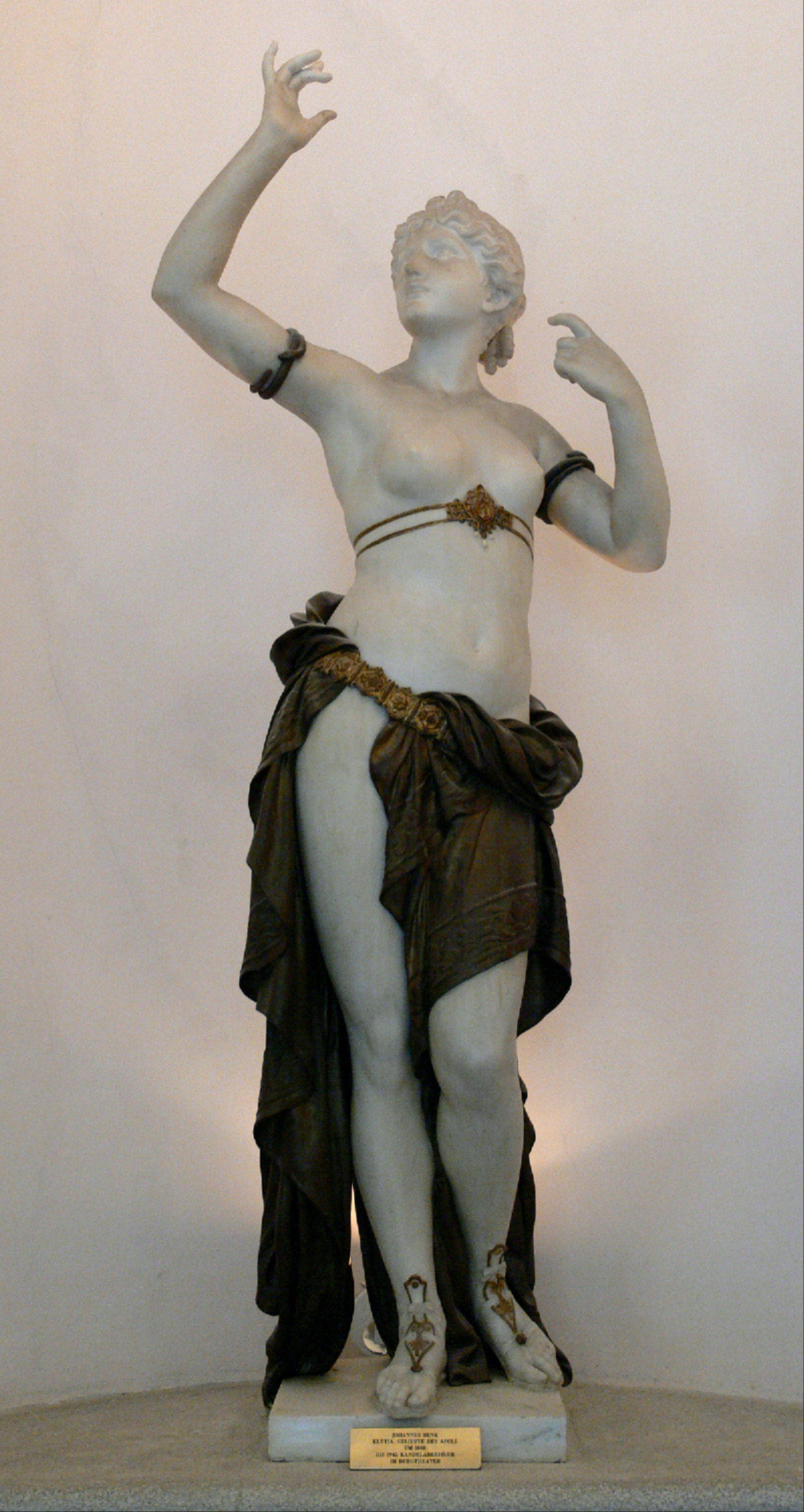 Klytia, Geliebte des Apolls, bis 1945 Kandelaberfigur im Burgtheater; Österreichisches Theatermuseum, Wien